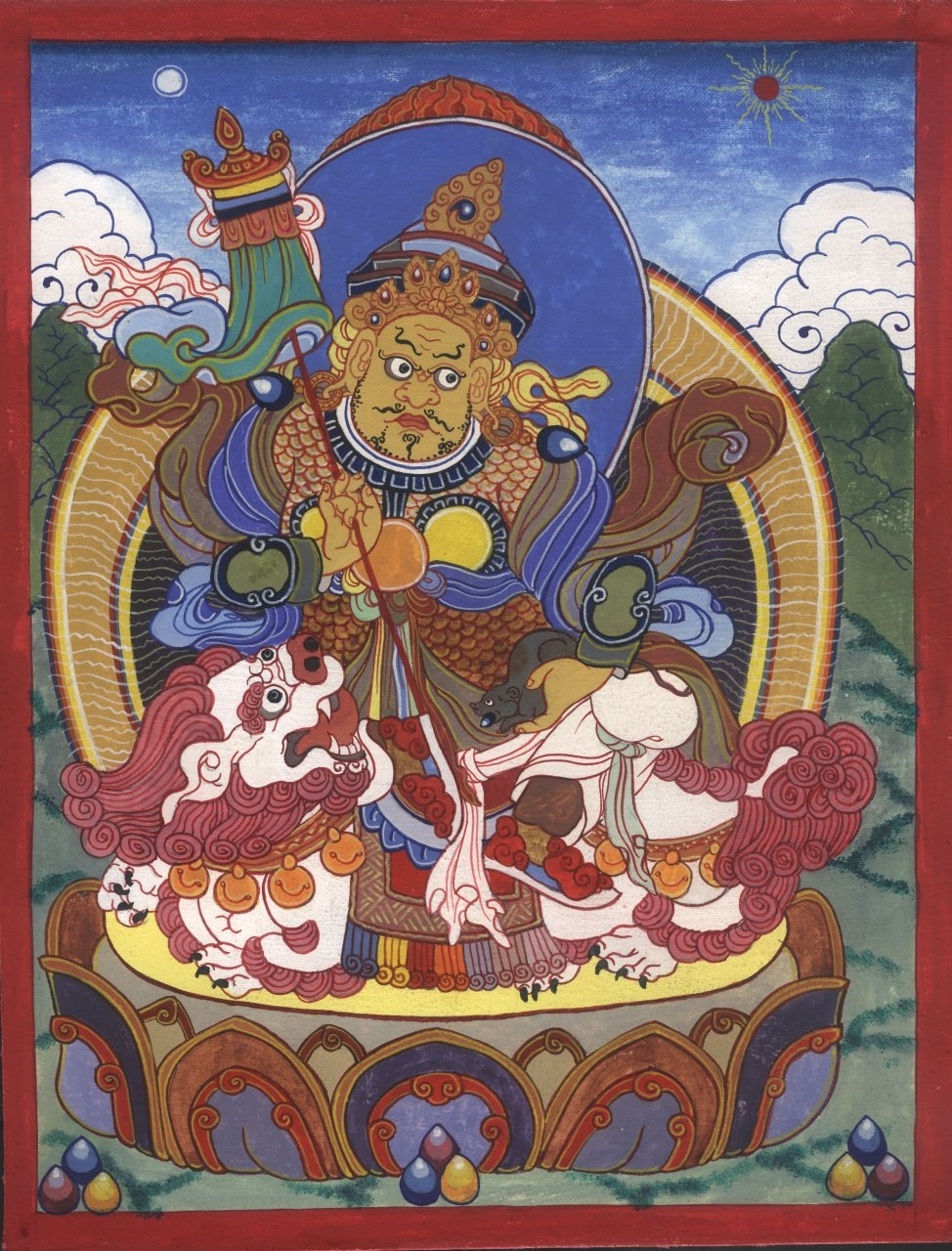 Kubera, Tempera auf Baumwolle, 20x27cm, Jahr 2002